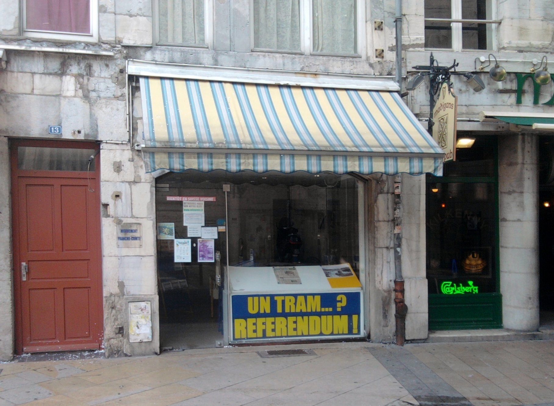 Le siège du Mouvement Franche-Comté, place du Huit Septembre à Besançon (Doubs, France).